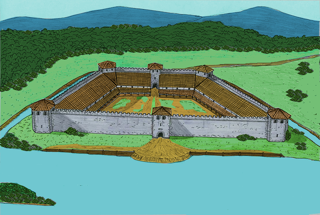 Rekonstruktionsversuch des spätantiken Kastell Altrip (D), 4. Jahrhundert n.Chr., nach einem Ausstellungsmodell im Hist. Museum der Pfalz.